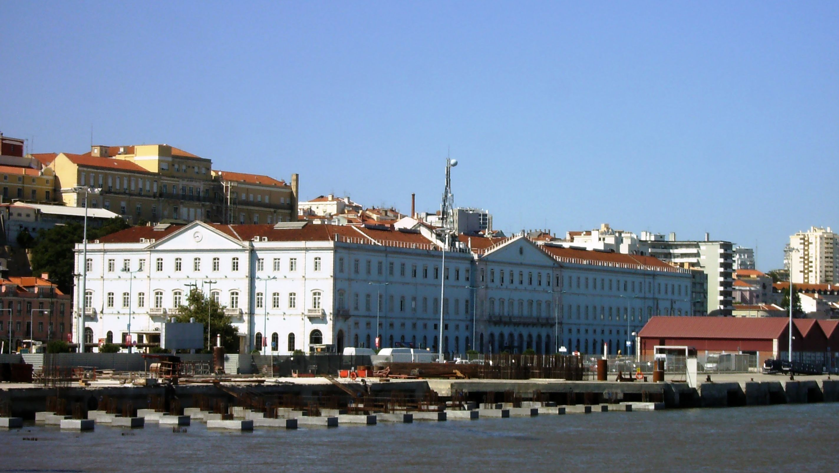 Estação Ferroviária de Santa Apolónia, Lisboa, Portugal: vista do rio Tejo.